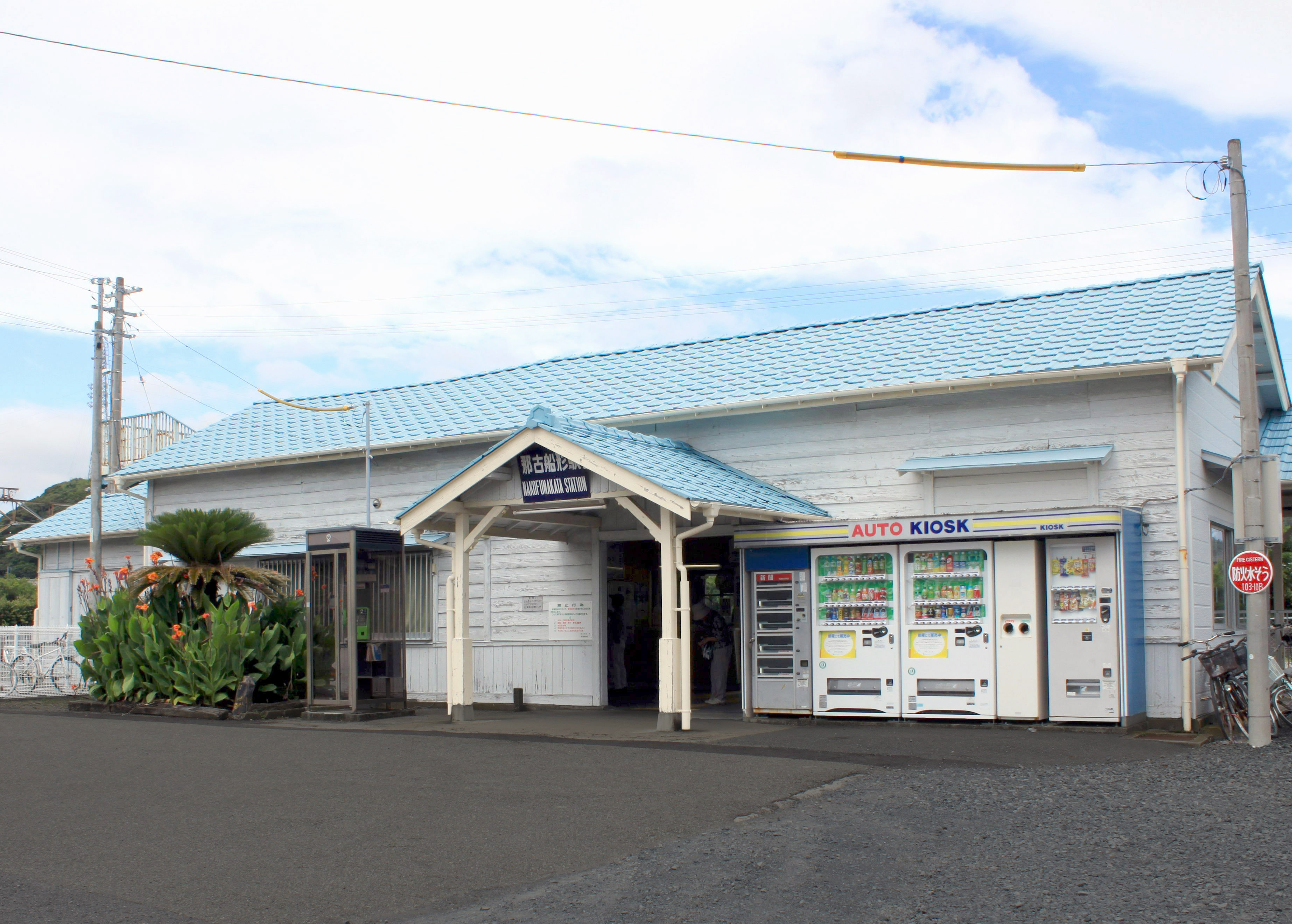 那古船形駅